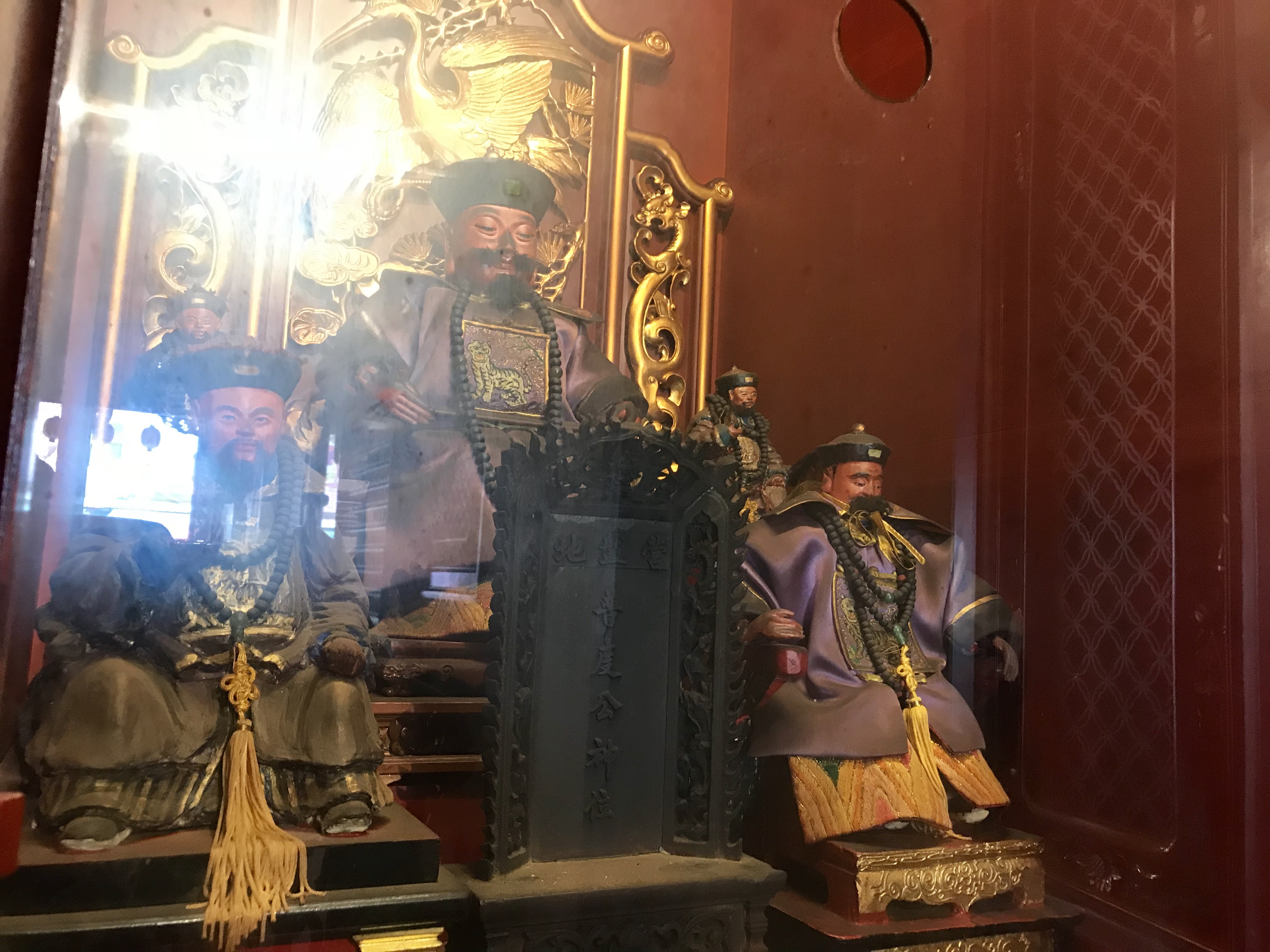 鹿港永安宮普渡公神位與曾紹龍神像